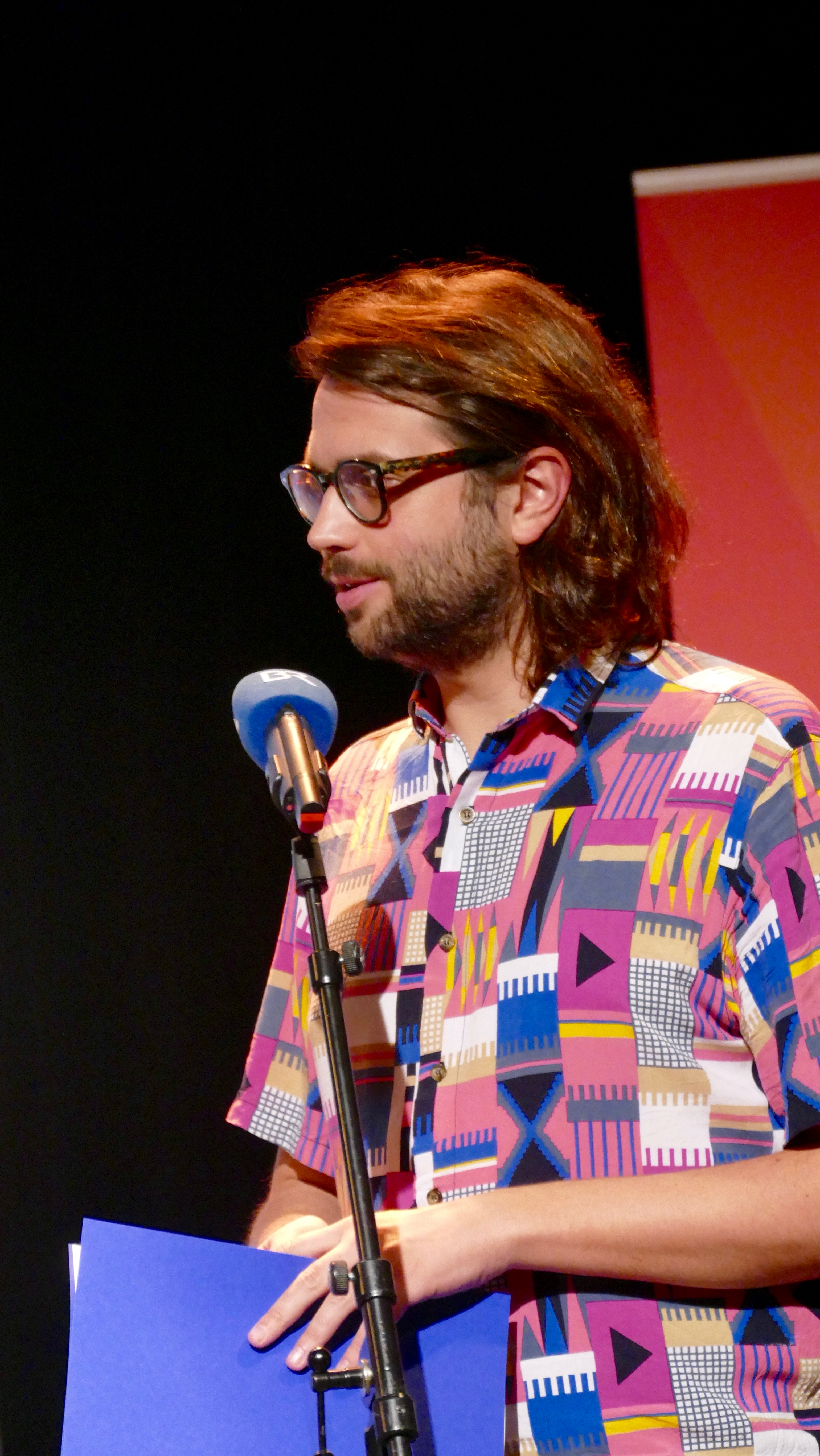 Der Schriftsteller und Theaterautor Michel Decar erhält den Bayen2-Wortspiele-Preis für einen Auszug aus seinem Roman "Tausend Deutsche Diskotheken"